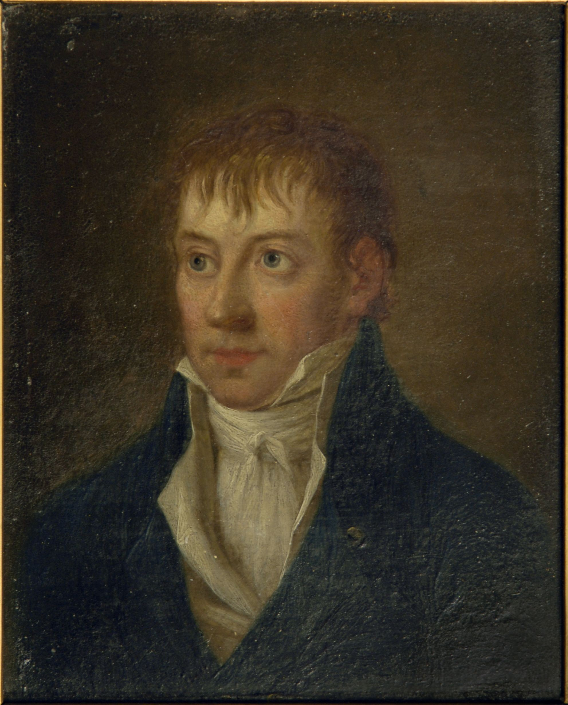 Carl Gottlob Rafn (1769-07-31 - 1808-05-15), Botaniker og økonom